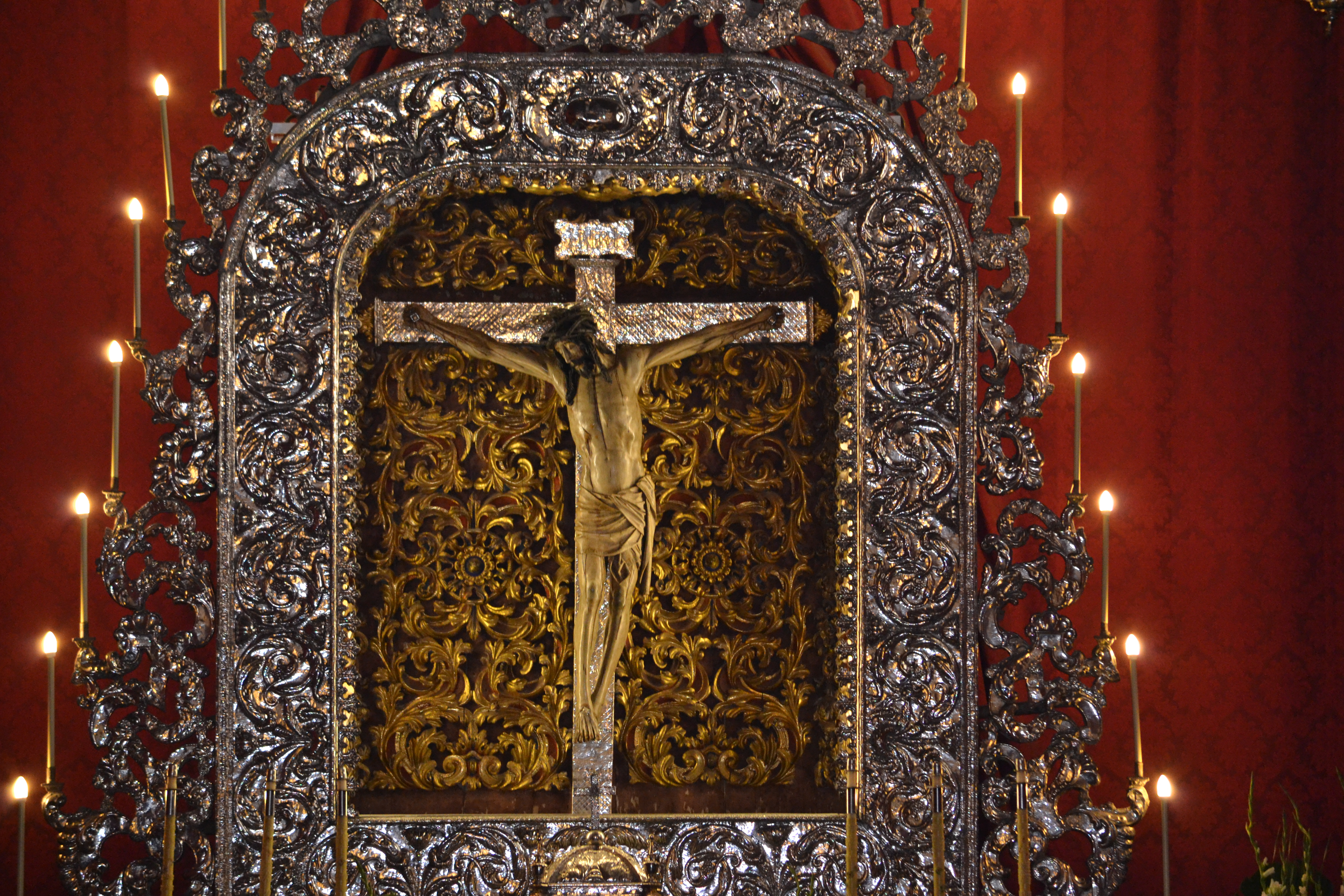 Colección Cristo de La Laguna by elduendesuarez